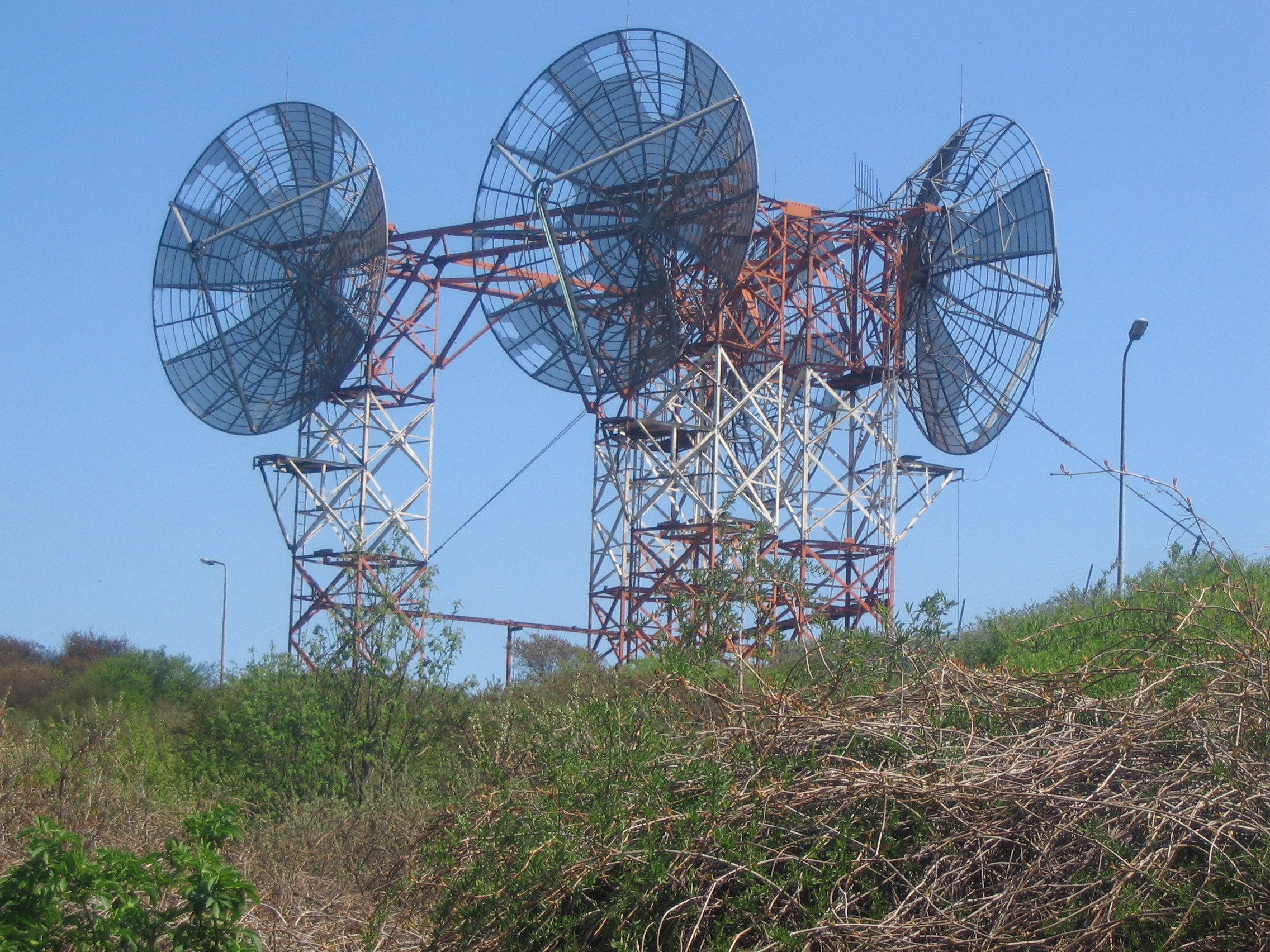 Straalzender (Hoek van Holland): De straalzender of troposcatter in Hoek van Holland, Nederland, is een voormalig Amerikaans radio-relaystation met vier grote schotelantennes. De vier schotelantennes werden tijdens de Koude Oorlog in 1967 en deels in de jaren 50 gebouwd. De zender werd gebruikt om berichten door te sturen van West-Duitsland, via het Verenigd Koninkrijk naar de Verenigde Staten. Sinds de val van IJzeren Gordijn staat het complex, nadat het overgedragen is aan het ministerie van Defensie, ongebruikt in de duinen.